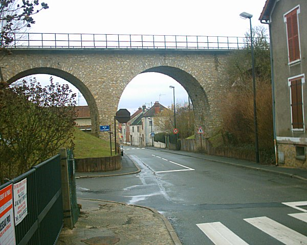 Pont de chemin de fer sur la Rue de la Vallée, Jouy-le-Moutier on 03/03/06.